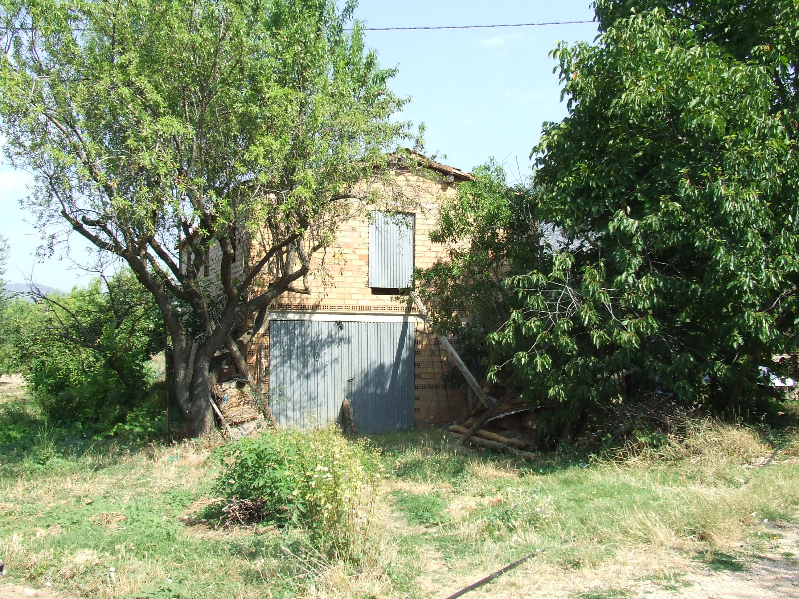 Cal Peó (Abella de la Conca, Pallars Jussà)